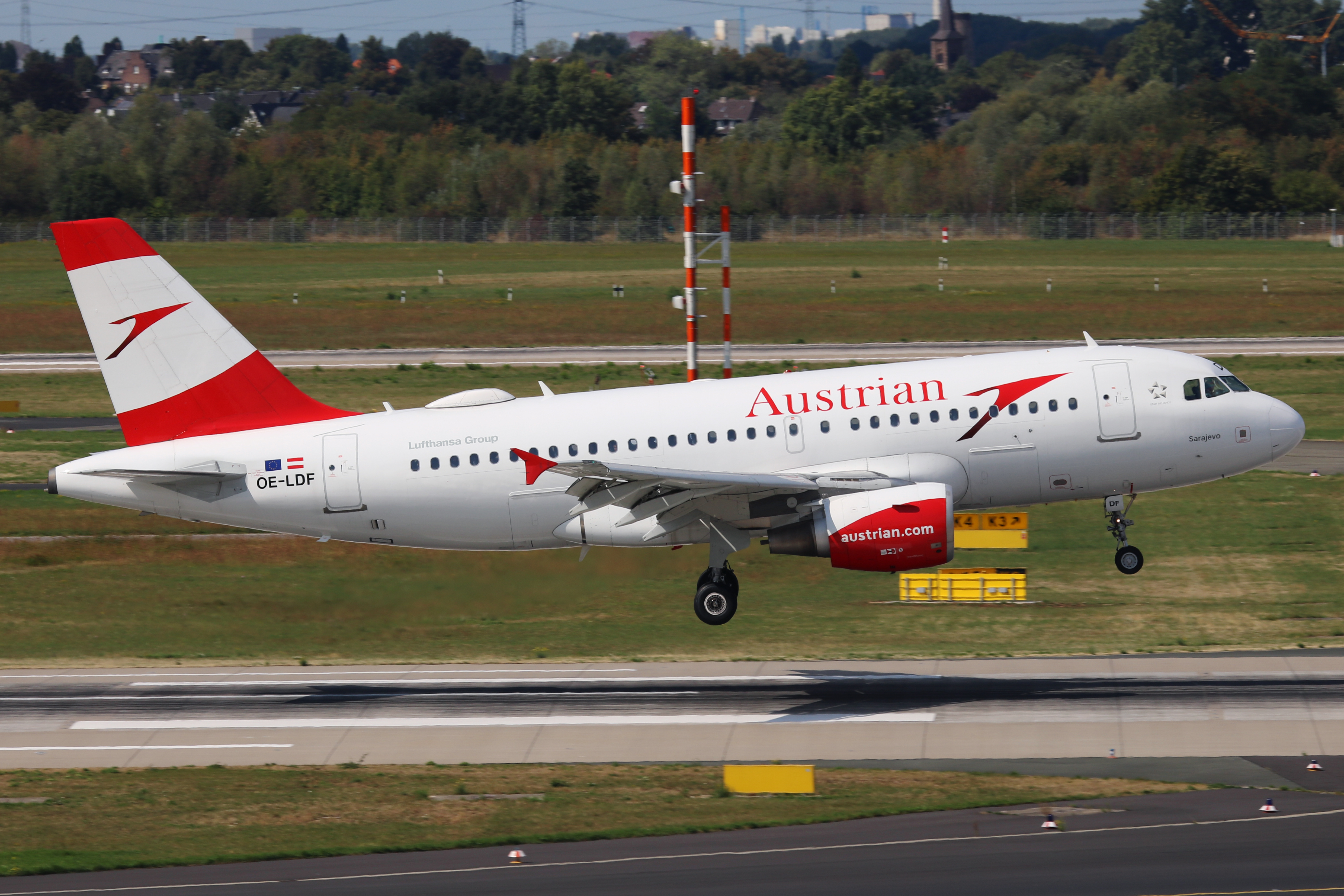 Flughafen Düsseldorf, Airbus A319-100 (OE-LDF) der Austrian Airlines